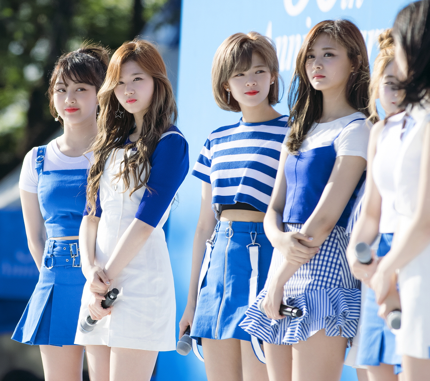 170514 포카리스웨트 30주년 블루런 행사 트와이스